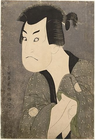 Sakata Hangoras III vaidina blogietį Fudžikavą Mizuemoną